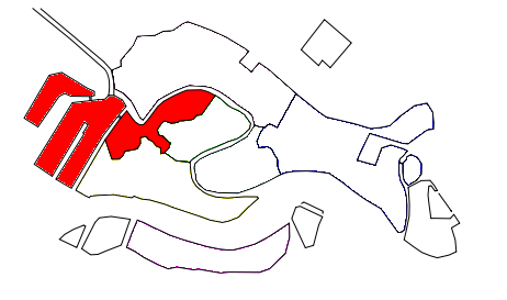 Sestiere di Santa Croce a Venezia